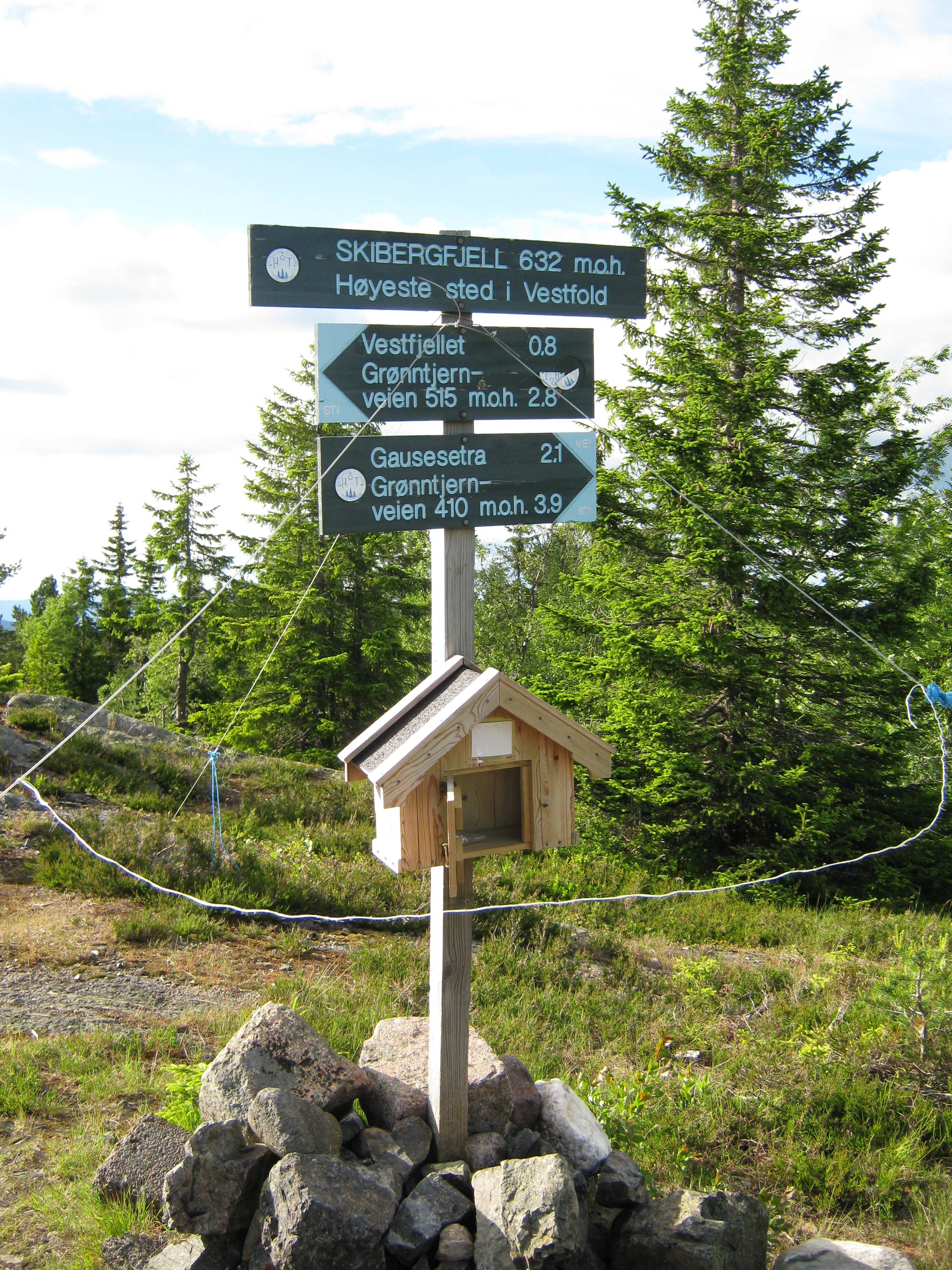 Skilt på toppen av Skibergfjell i Hof kommune i Vestfold.